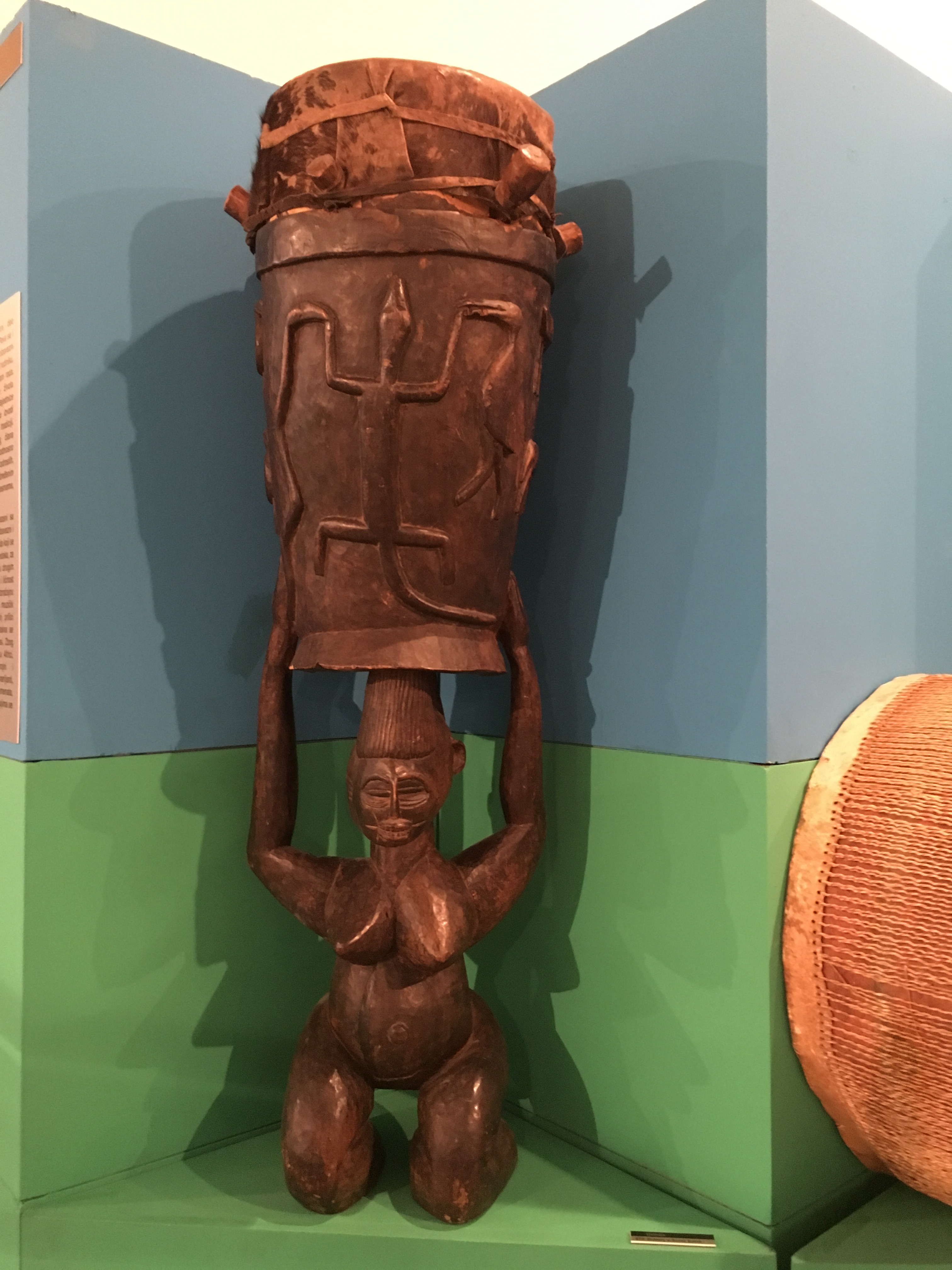 Srpski (latinica): Tam-tam je bubanj iz svete šume. Veruje se da je sveti predmet i da je samo vrač mogao da ga svira. Pronašli su ga Veda Zagorac i Zdravko Pečar, a eksponat se nalazi u Muzeju afričke umetnosti u Beogradu.